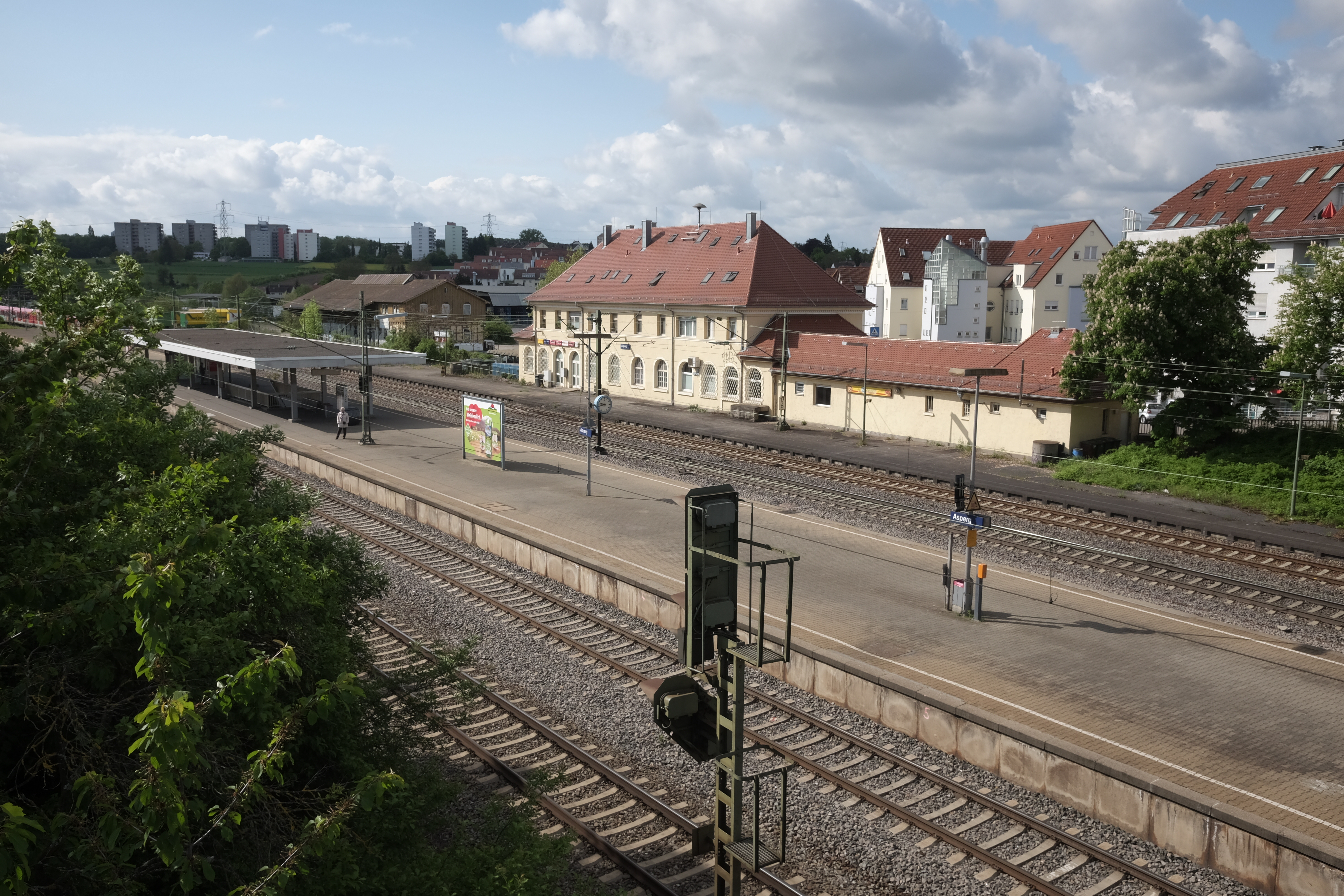 Der Asperger Bahnhof von der nördlichen Lehenbrücke aus gesehen.